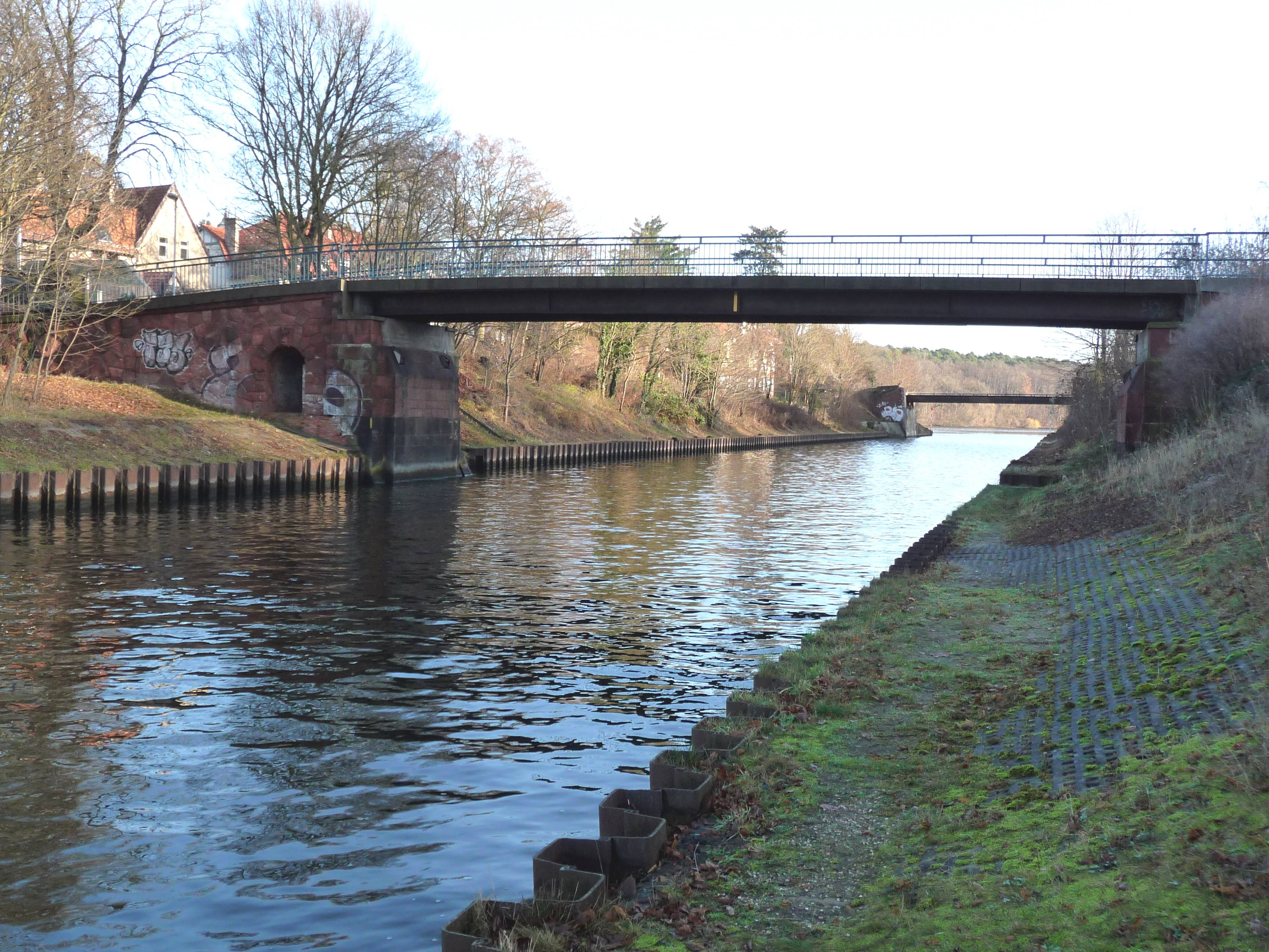 Parkbrücke über den Teltowkanal im Potsdamer Stadtteil Babelsberg